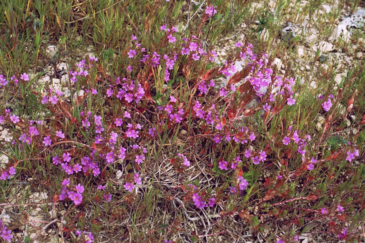 Lythrum junceum, Weiderichgewächse (Lythraceae) – Griechenland/Ελλάδα/Greece: SSE Miniá/Μηνιά, W Svoronáta/Σβορωνάτα (Kefallinia/Κεφαλληνία)